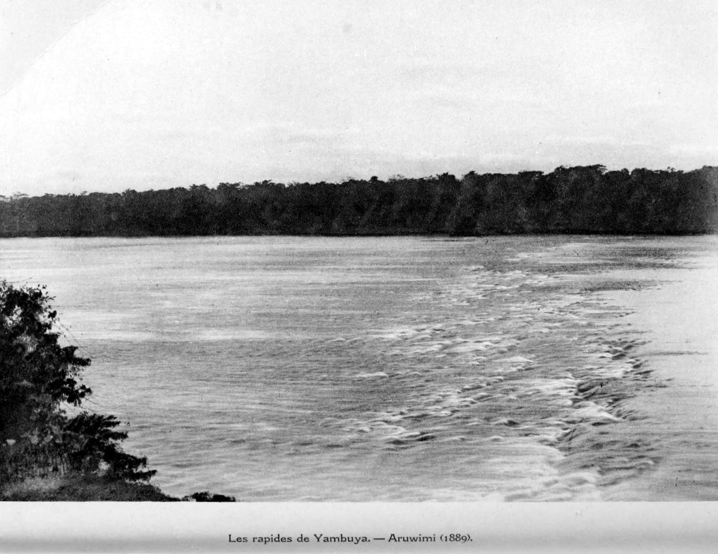 Les rapides de Yambuya. - Aruwimi (1889) - p. 319